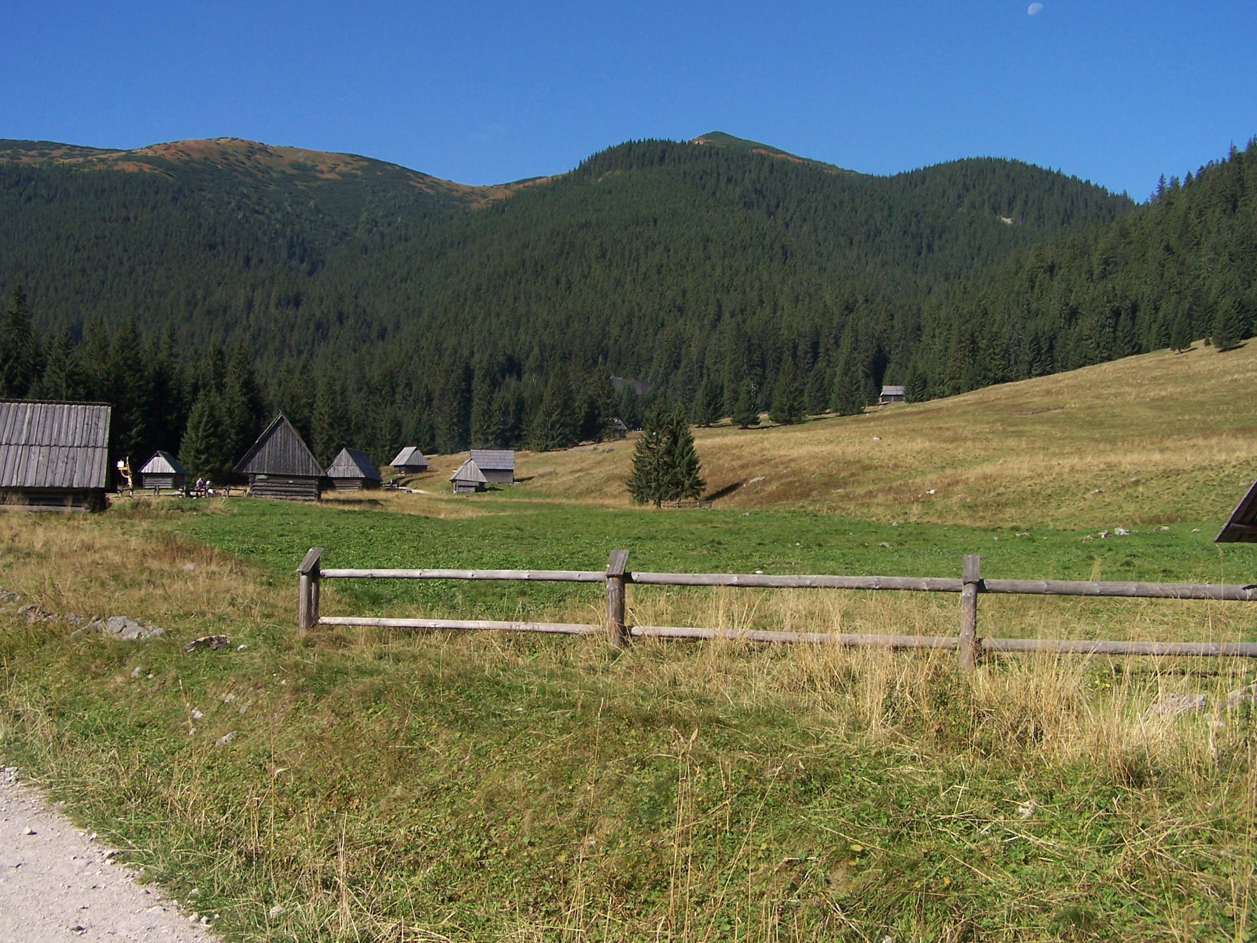 Dolina Chochołowska